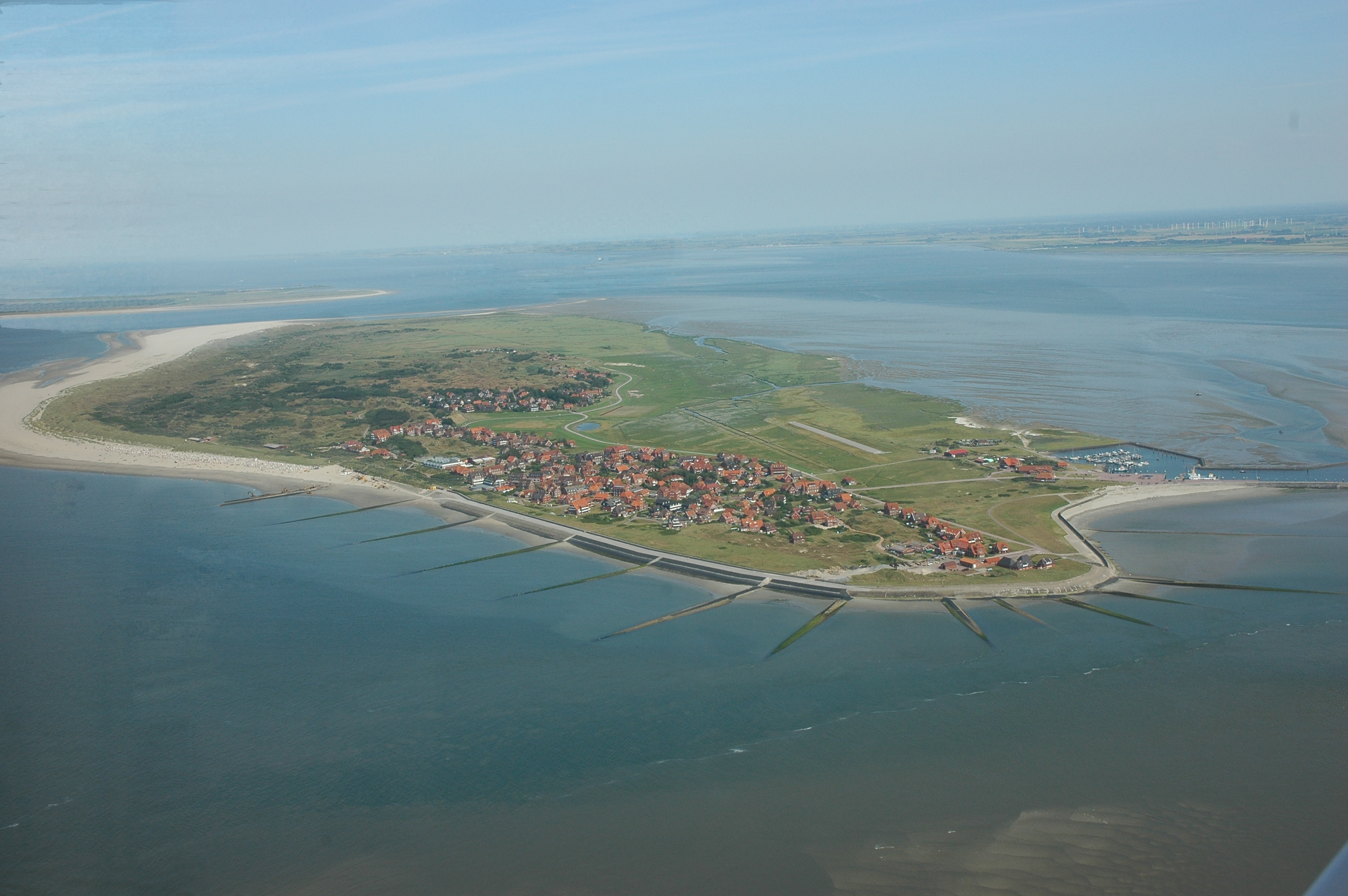 luftaufnahme Baltrum